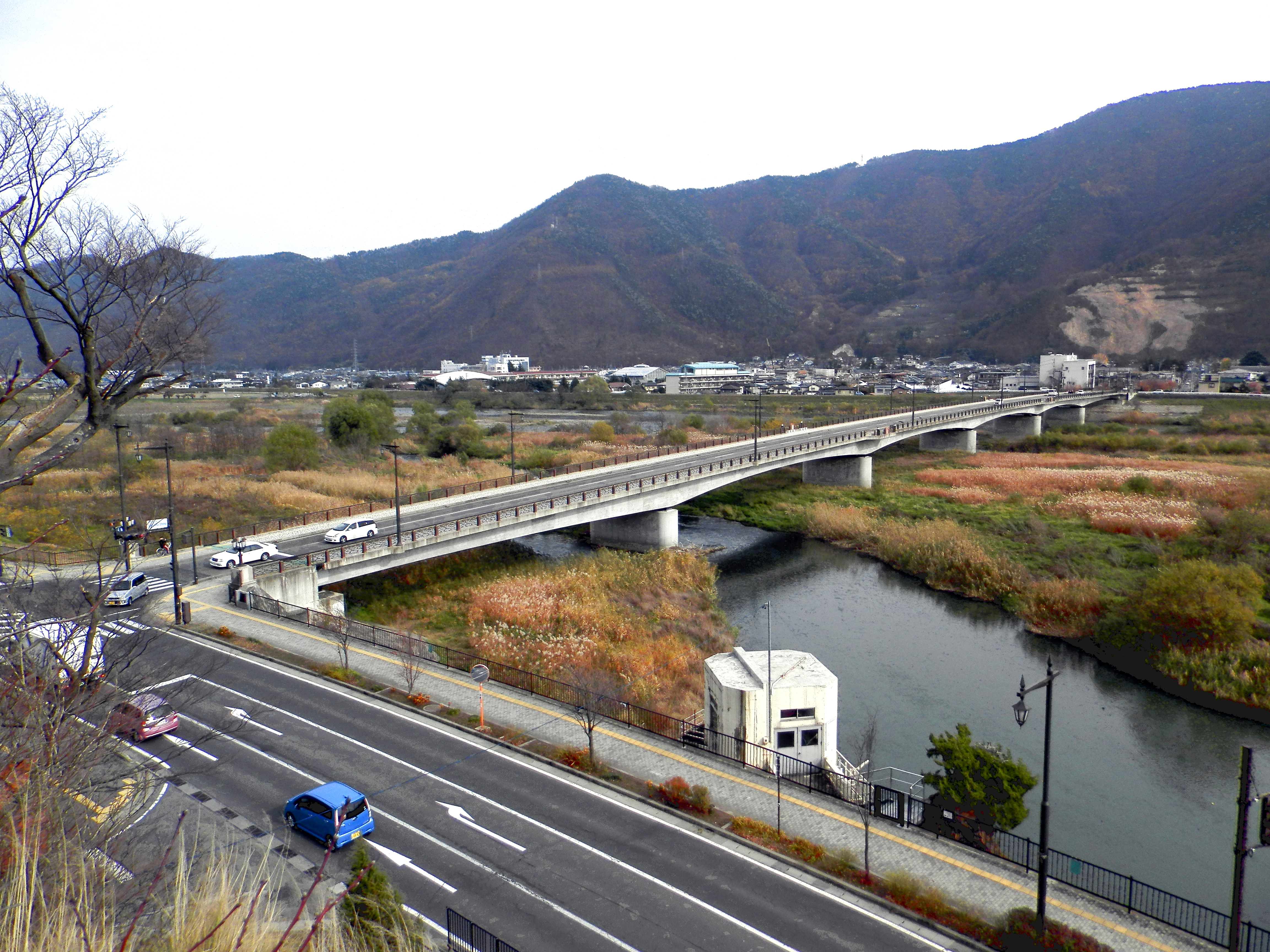 千曲川に架かる大正橋